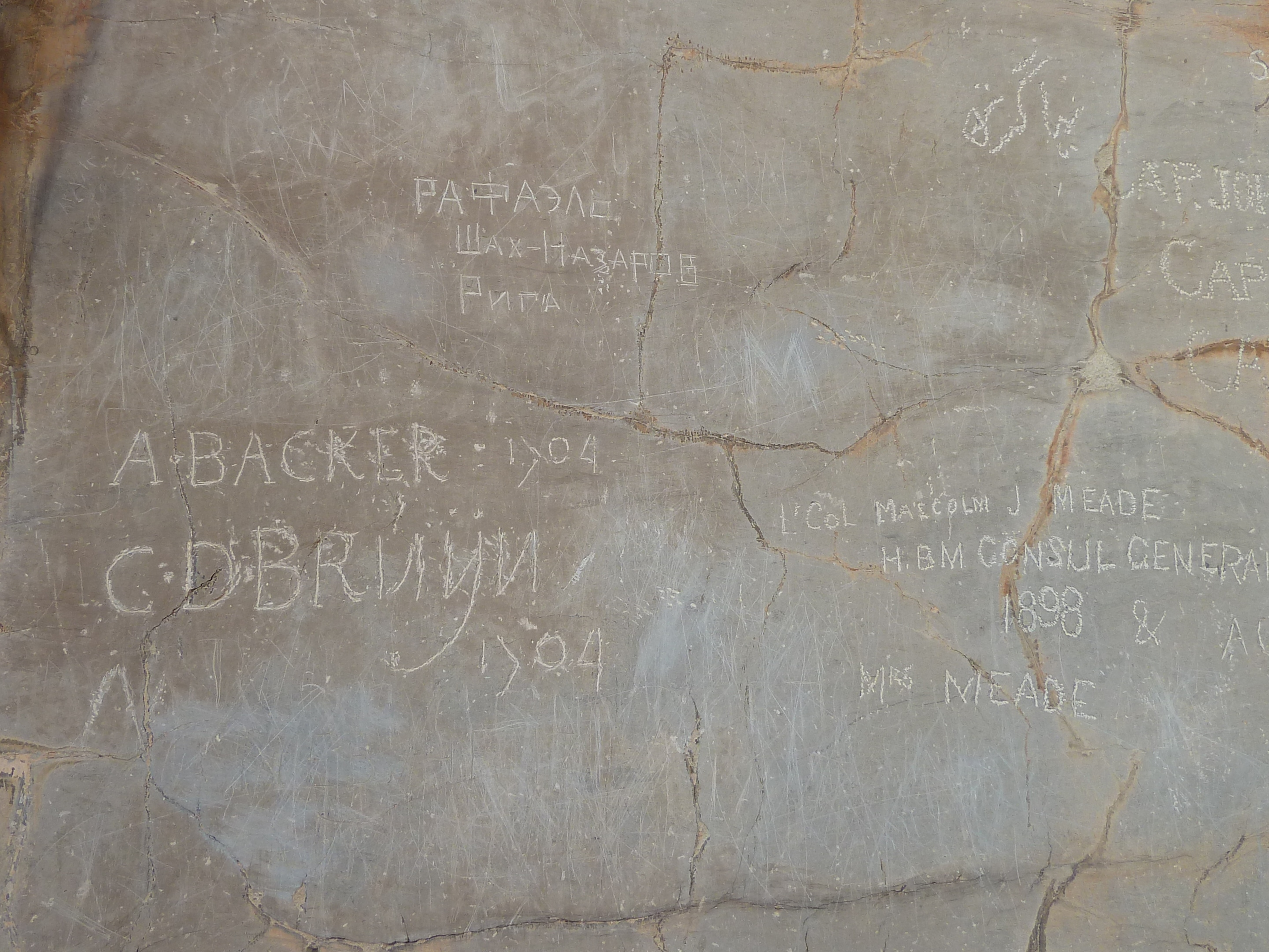 Graffiti met de initialen van Cornelis de Bruijn en VOC-functionaris Adriaan de Backer op de Poort van alle Naties. Begin 20e eeuw kerfde Maurits Wagenvoort zijn inscriptie er ook onder en maakte er een foto van, maar omdat zijn inscriptie zo onduidelijk was liet hij de foto bewerken voor zijn memoires om zijn handschrift duidelijker te maken.[1]